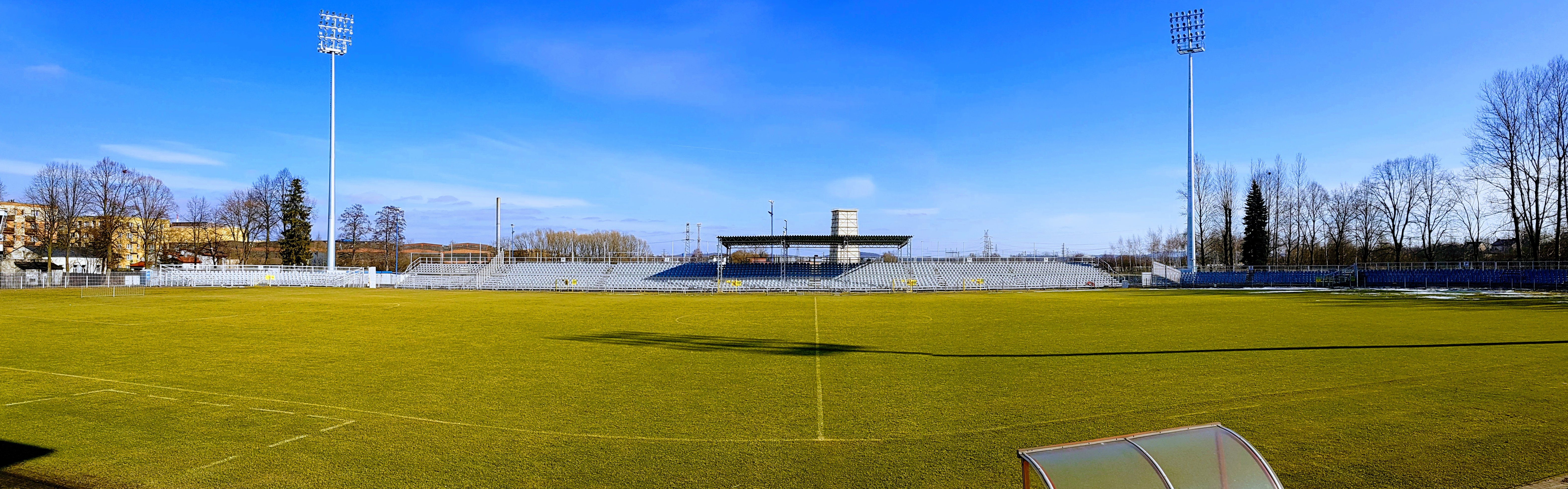 Miejski Stadion Piłkarski Raków